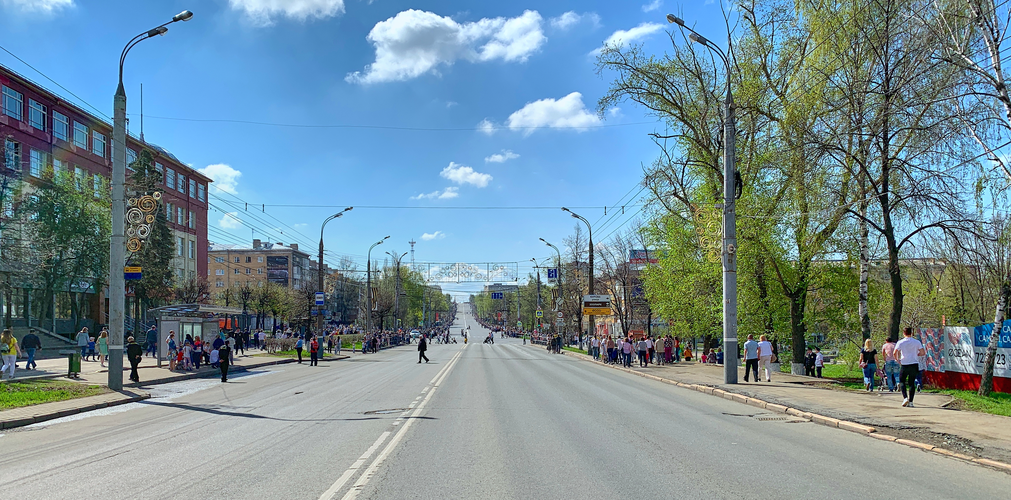 Пушкинская улица в Ижевске (вид на юг, ближайший перекрёсток - с улицей Кирова) перед началом парада Победы в 2019 году